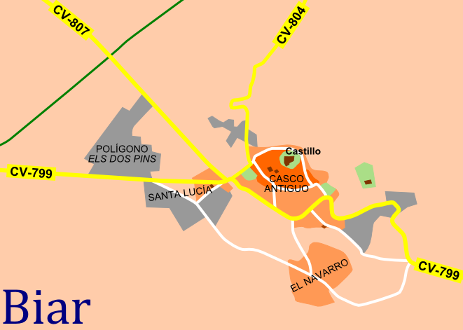 Accesos de Biar